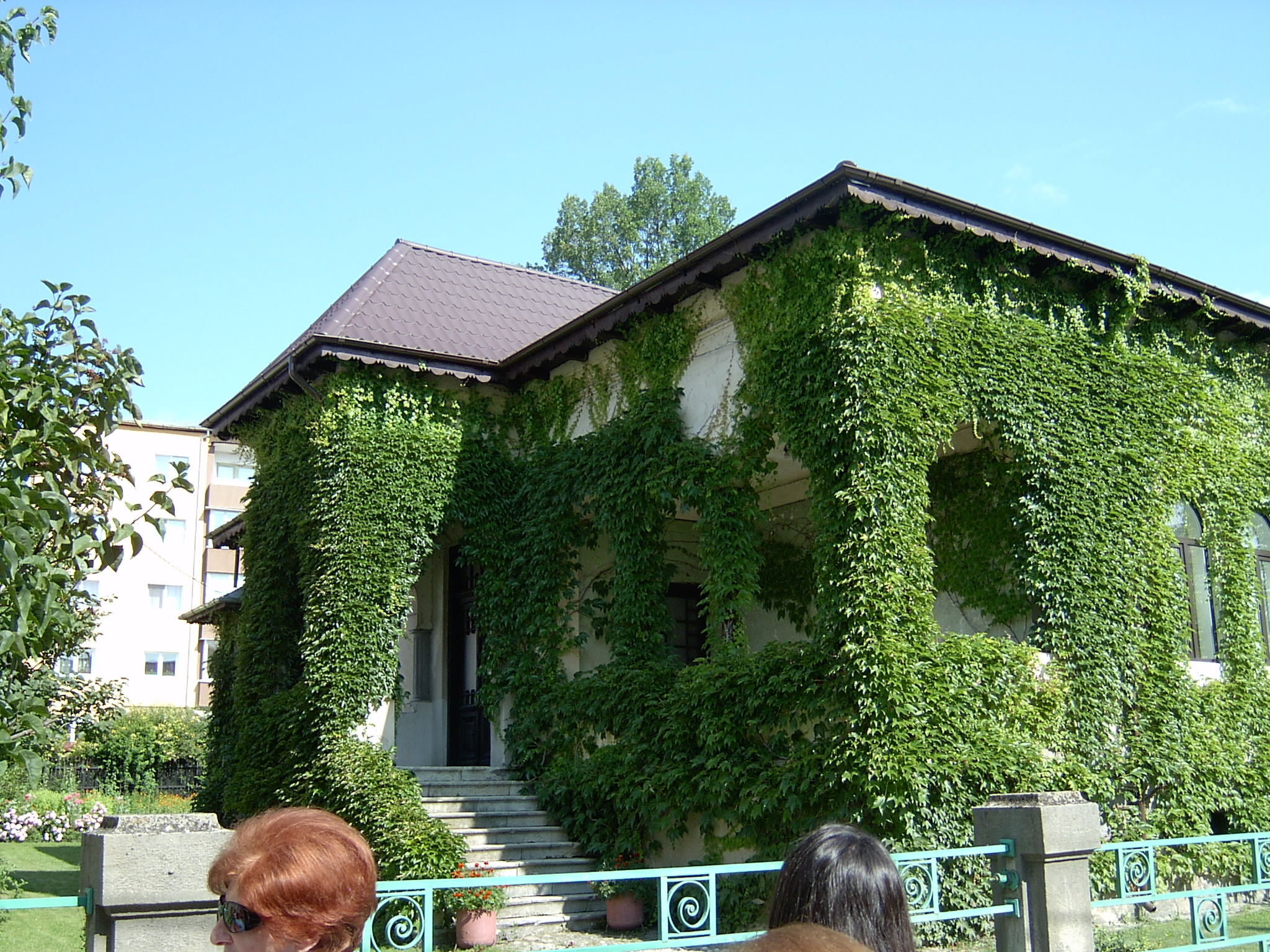 Casa Olaru din Câmpulung